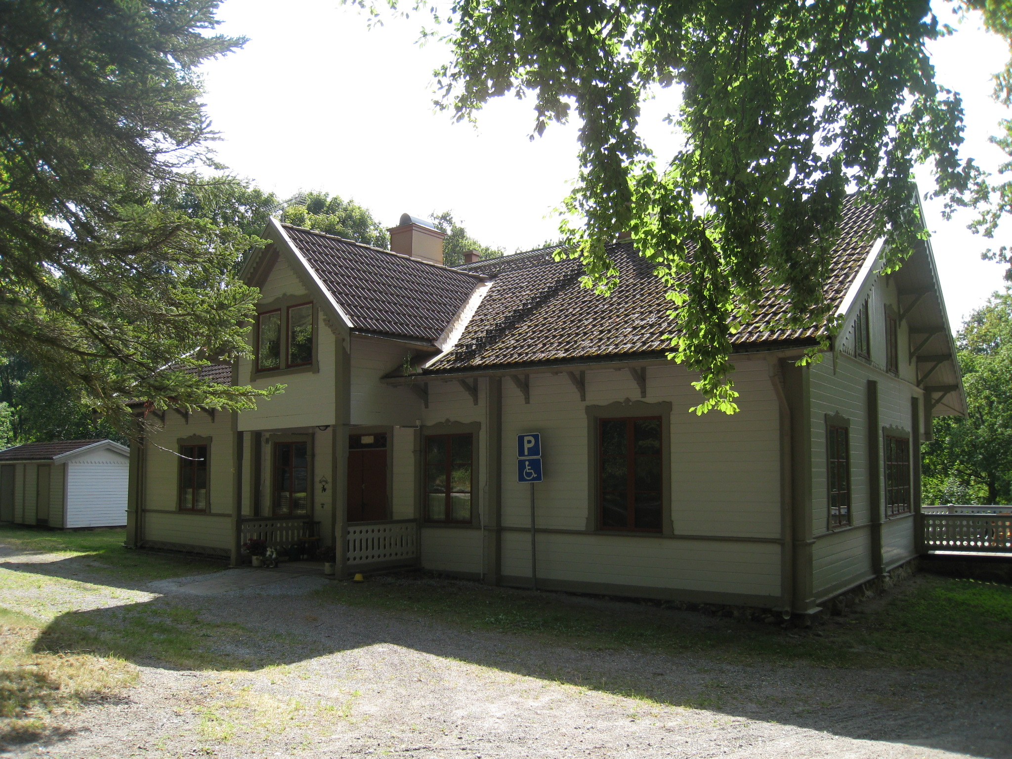 Sandviks gård i Görvälns naturreservat i Järfälla kommun, Stockholms län. Huvudbyggnaden från norr.